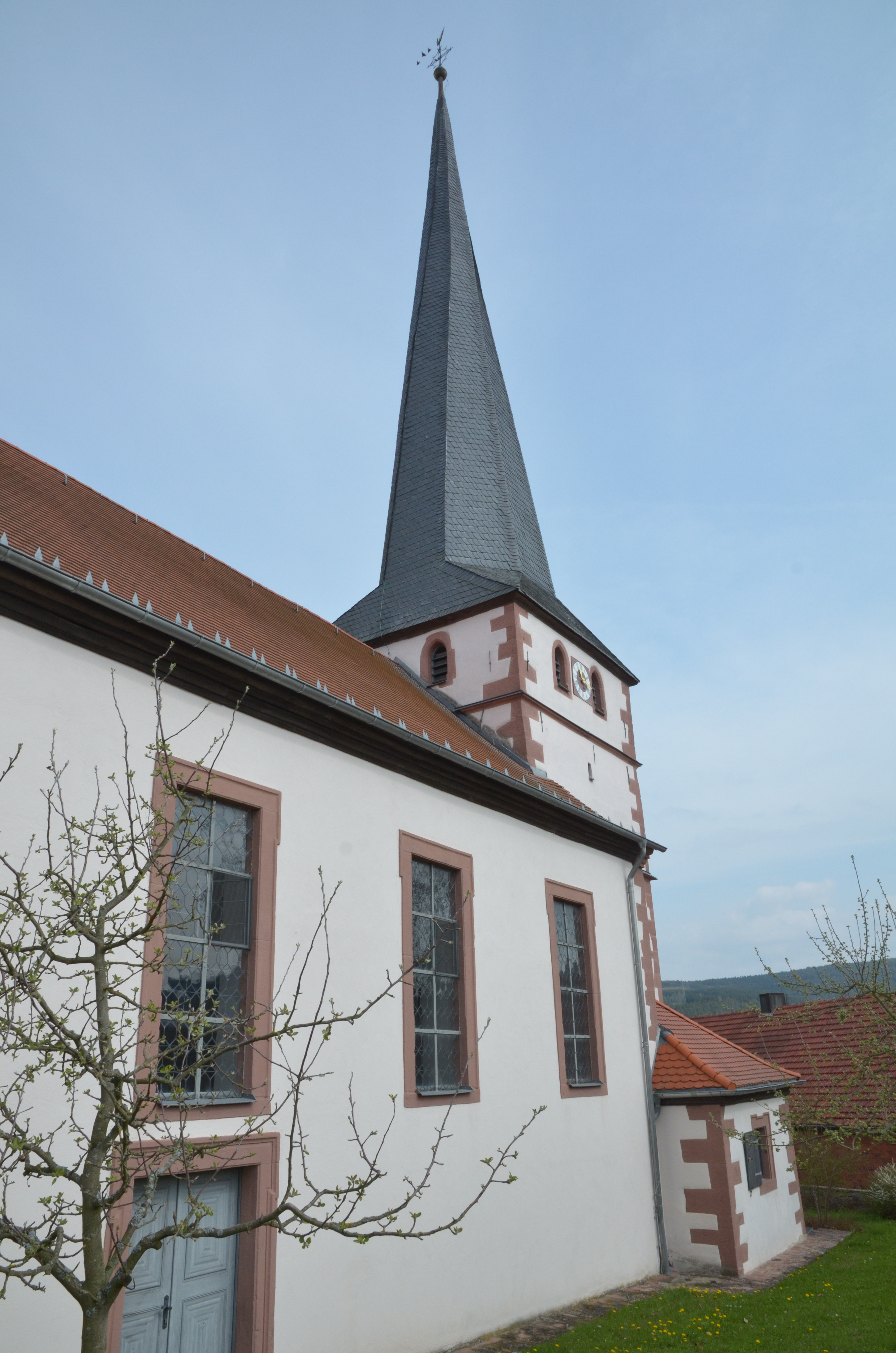 evang.-luth. Jakobuskirche in Mittelsinn